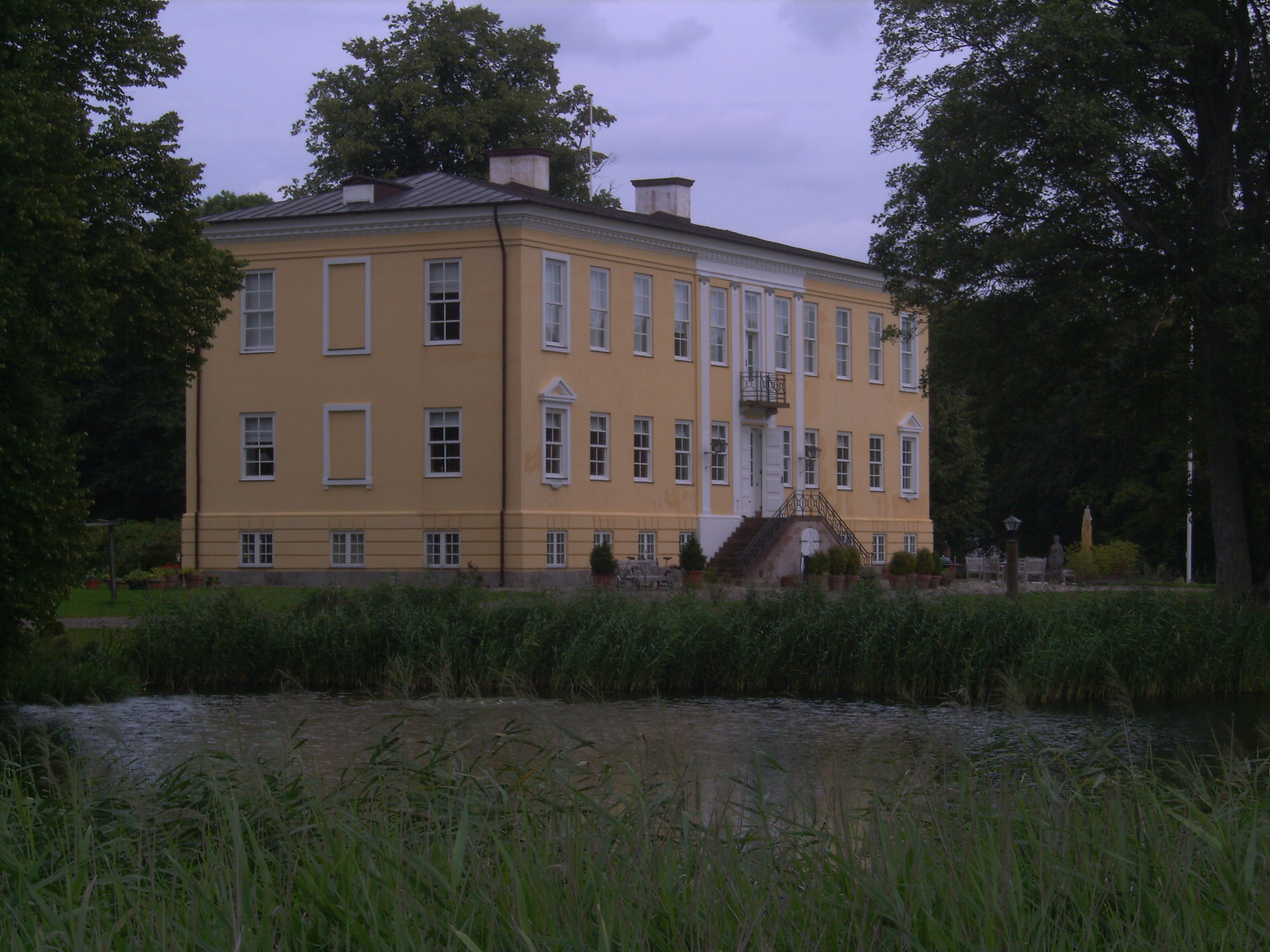 Stenalt, Ørsted Sogn,Rougsø Kommune